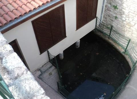 Su Kuyusu-Merkez Efendi